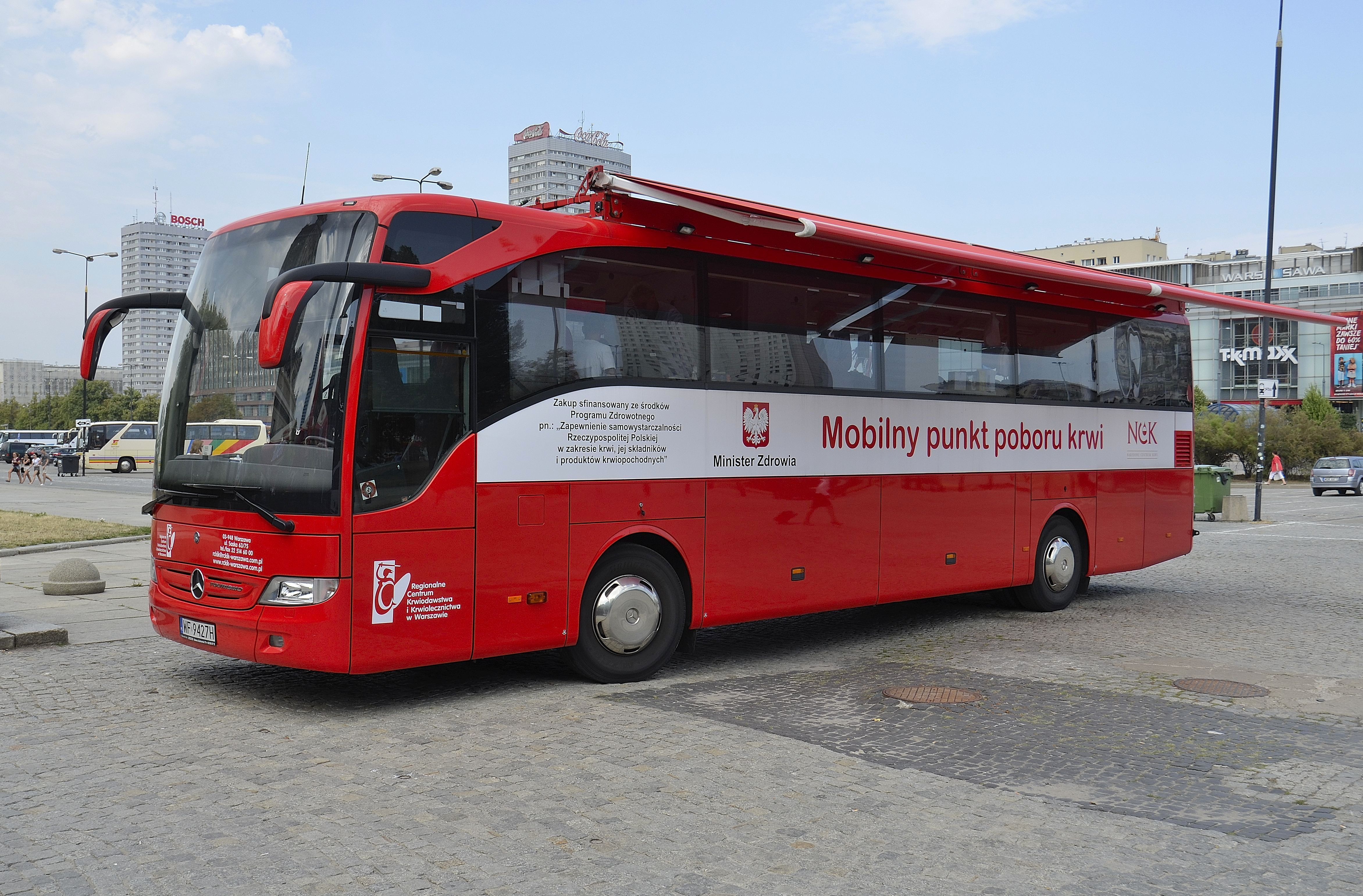 Mobilny punkt poboru krwi na placu Defilad w Warszawie